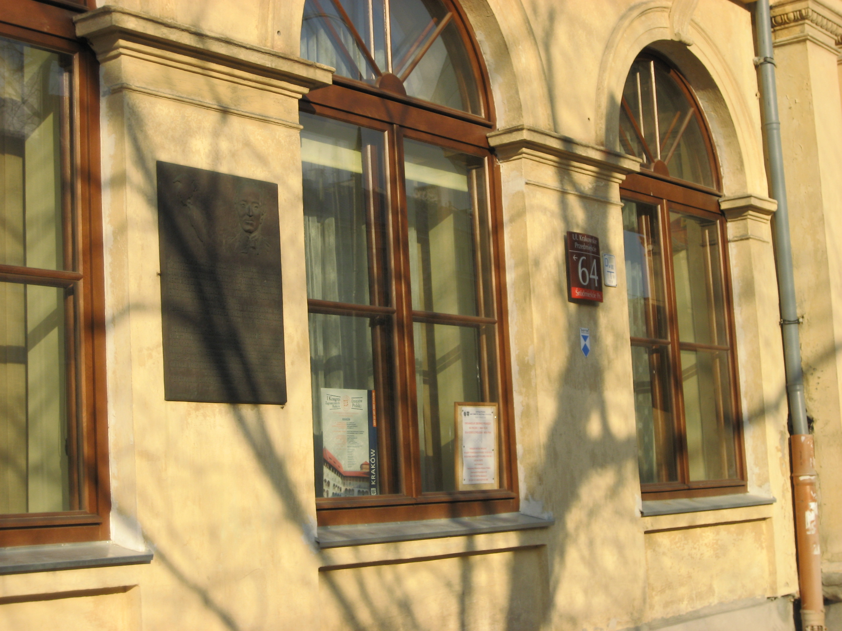 Krakowskie Przedmiescie 64, Warsaw, with plaque honoring Ignacy Domeyko.